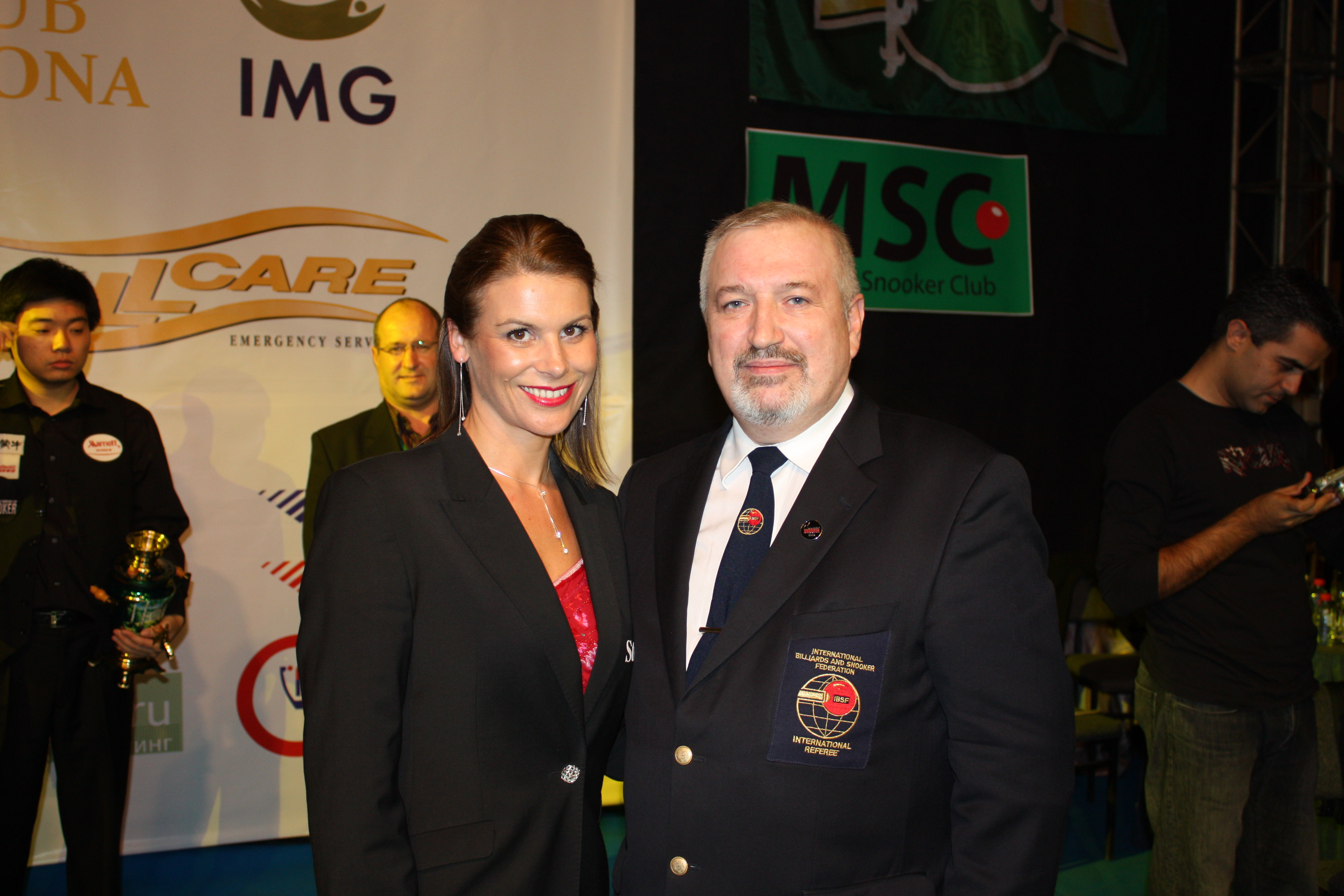 Туринир World Series of Snooker в Москве . Владимир Синицын и Микаэла Табб